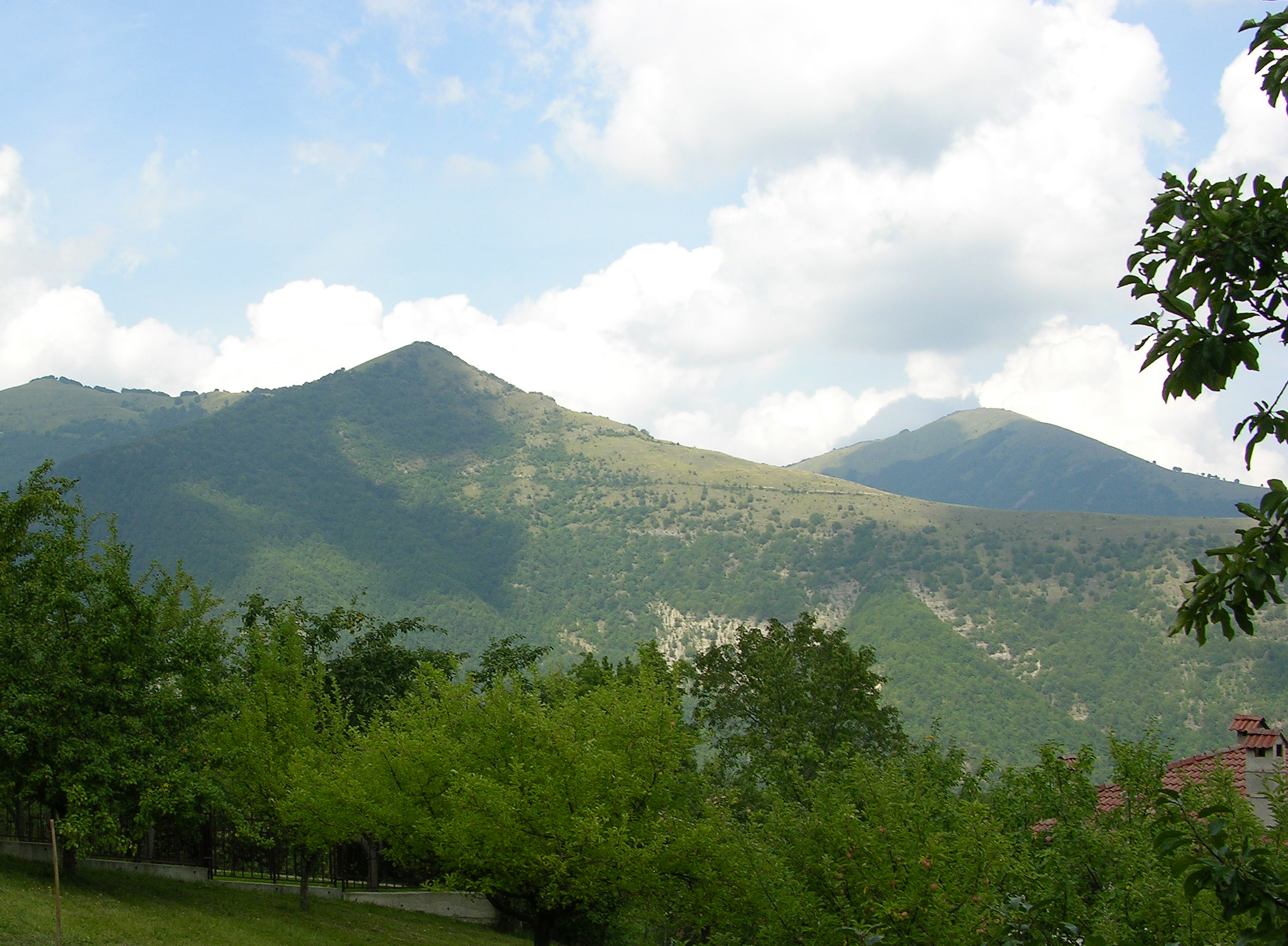 Monte Alfeo (sulla destra) situato nell'appennino ligure in provincia di Piacenza, visto da Fontanarossa frazione di Gorreto (GE).